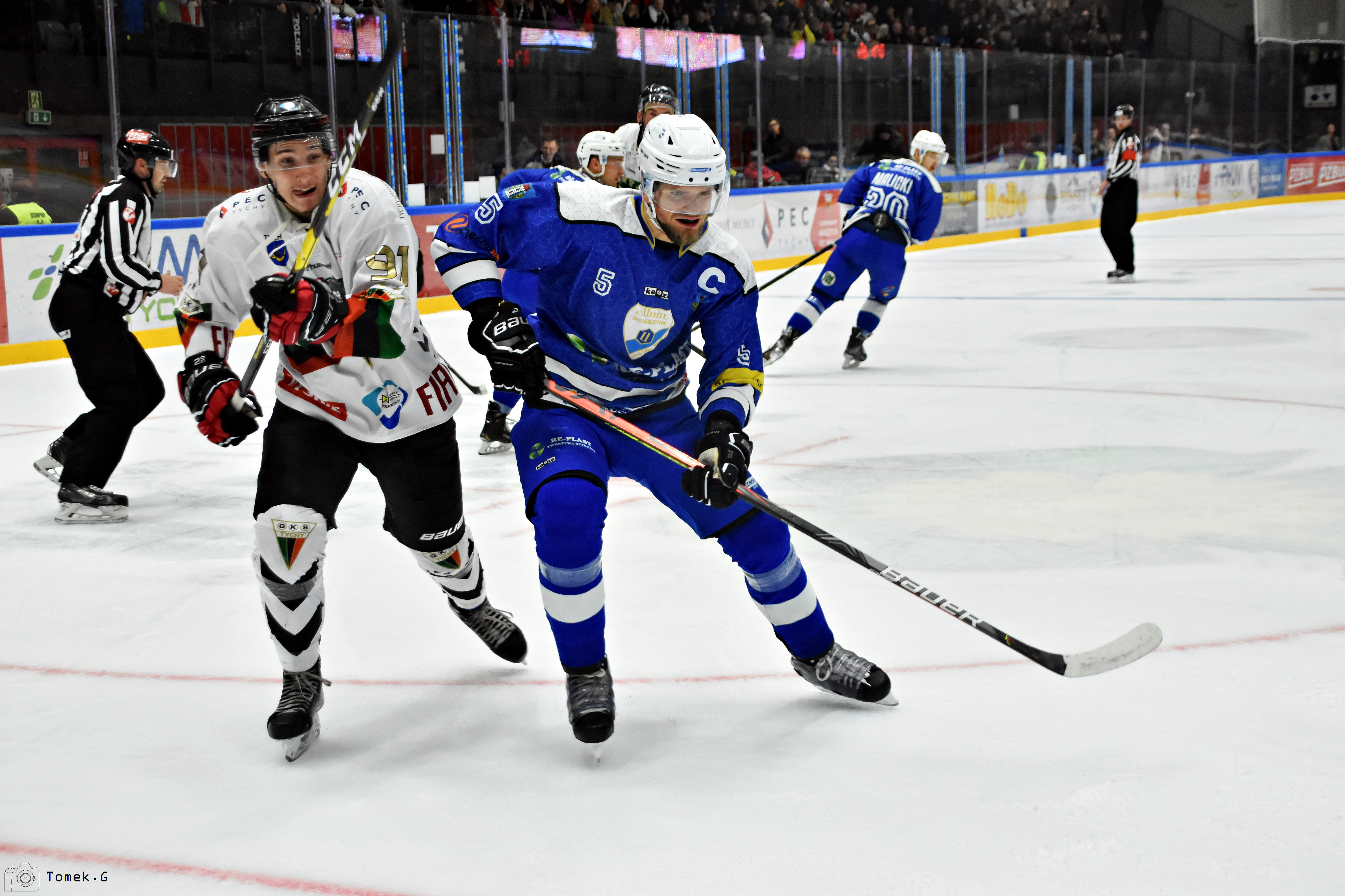 Puchar Polski w Hokeju na Lodzie 2019/2020